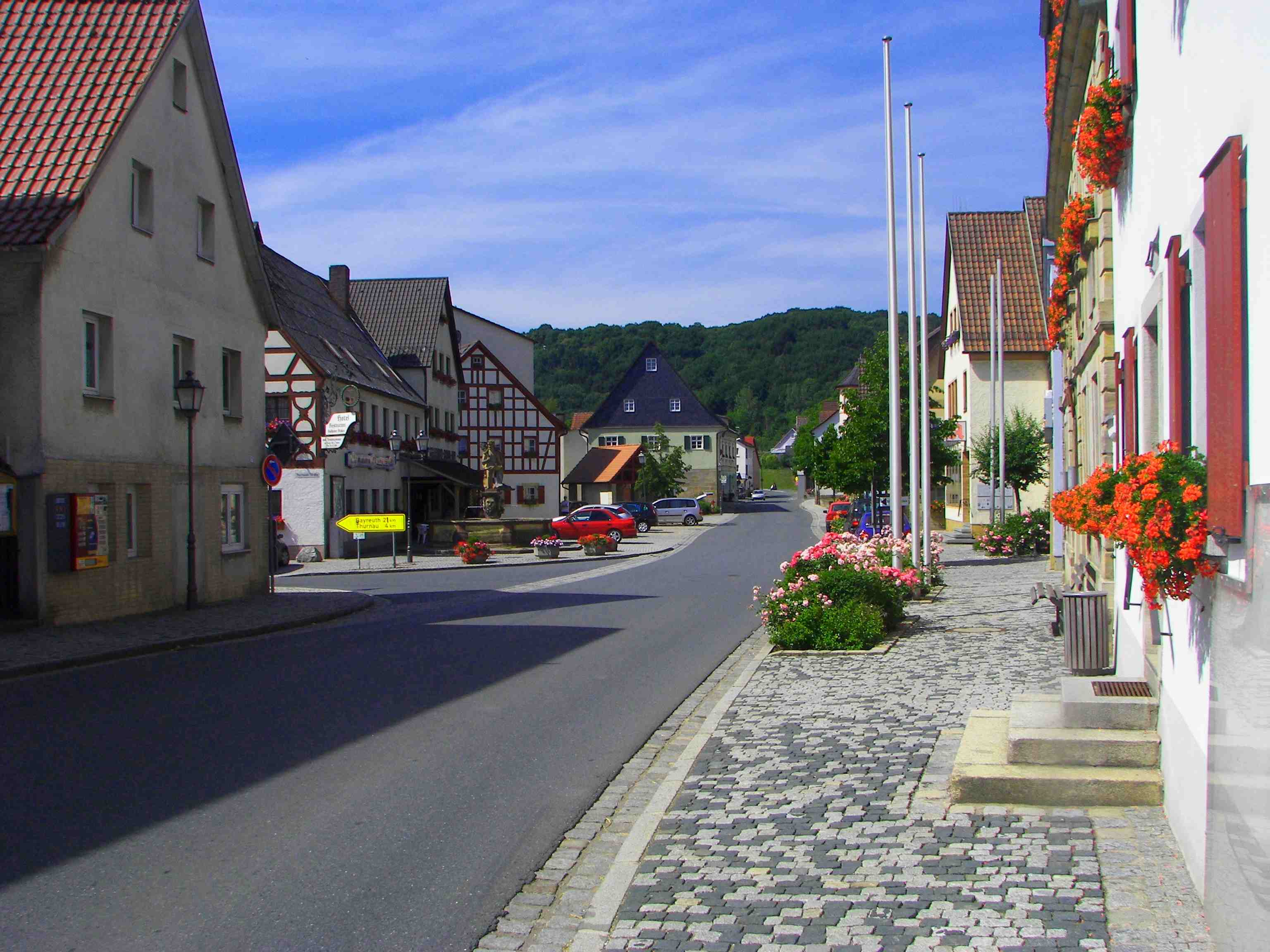 Die Hauptstraße von Kasendorf